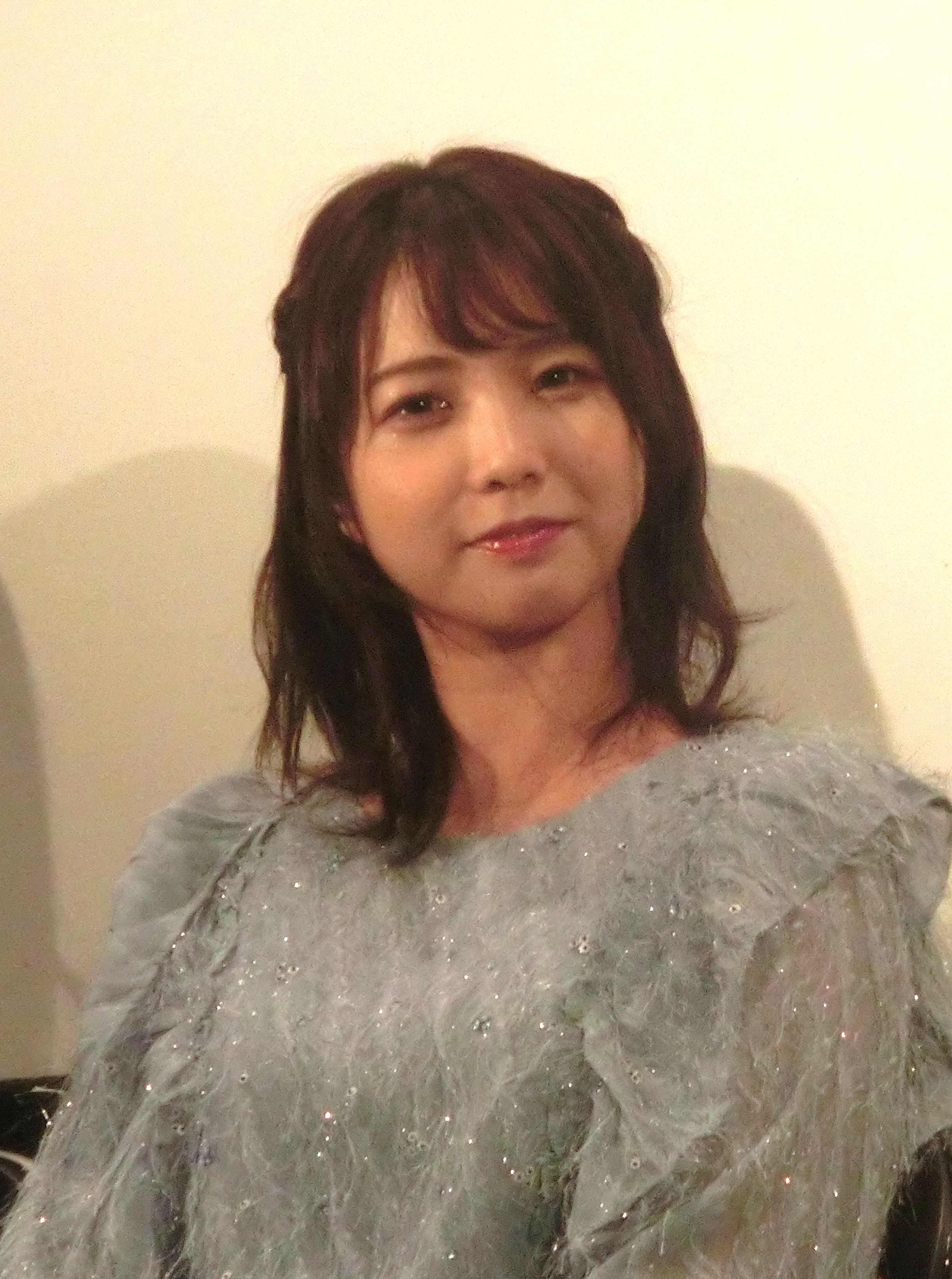 MATOKO TODA This file has been extracted from another file: UENO OKURA CIMG3004.jpg